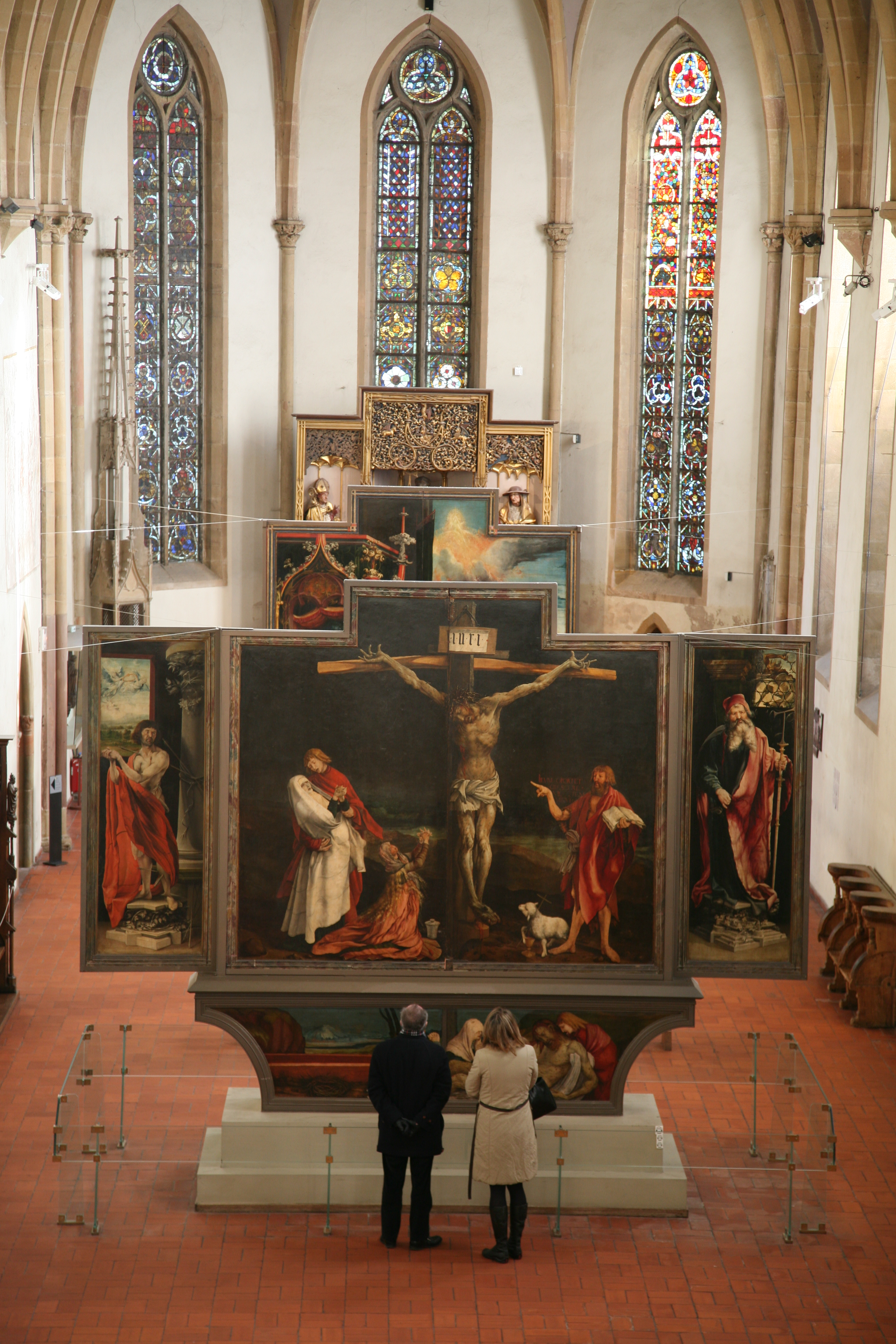 Le retable d'Issenheim. Exécuté pour l'église de la commanderie des Antonins d'Issenheim, chanoines hospitaliers qui accueillaient malades et pèlerins venus vénérer Saint Antoine, ce retable est le chef-d'oeuvre du musée d'UnterLinden. Présenté dans son lieu d'origine, il avait une fonction thaumaturgique : les malades priaient devant le polyptyque dans l'attente d'un miracle. La partie peinte du retable fut exécutée entre 1510 et 1516. Saint Sébastien et Saint Antoine, protecteur de l'ordre encadrent la crucifixion. Saint Jean-Baptiste, qui symbolise l'Ancien Testament, annonce le Nouveau Testament en montrant le Christ du doigt. La prédelle illustre la mise au tombeau. Saint Sébastien : Patron des archers, premiers des saints implorés contre la peste, il est représenté indifférent à la douleur. La tradition y reconnaît les traits de Mathias Grünewald, qui se serait représenté.